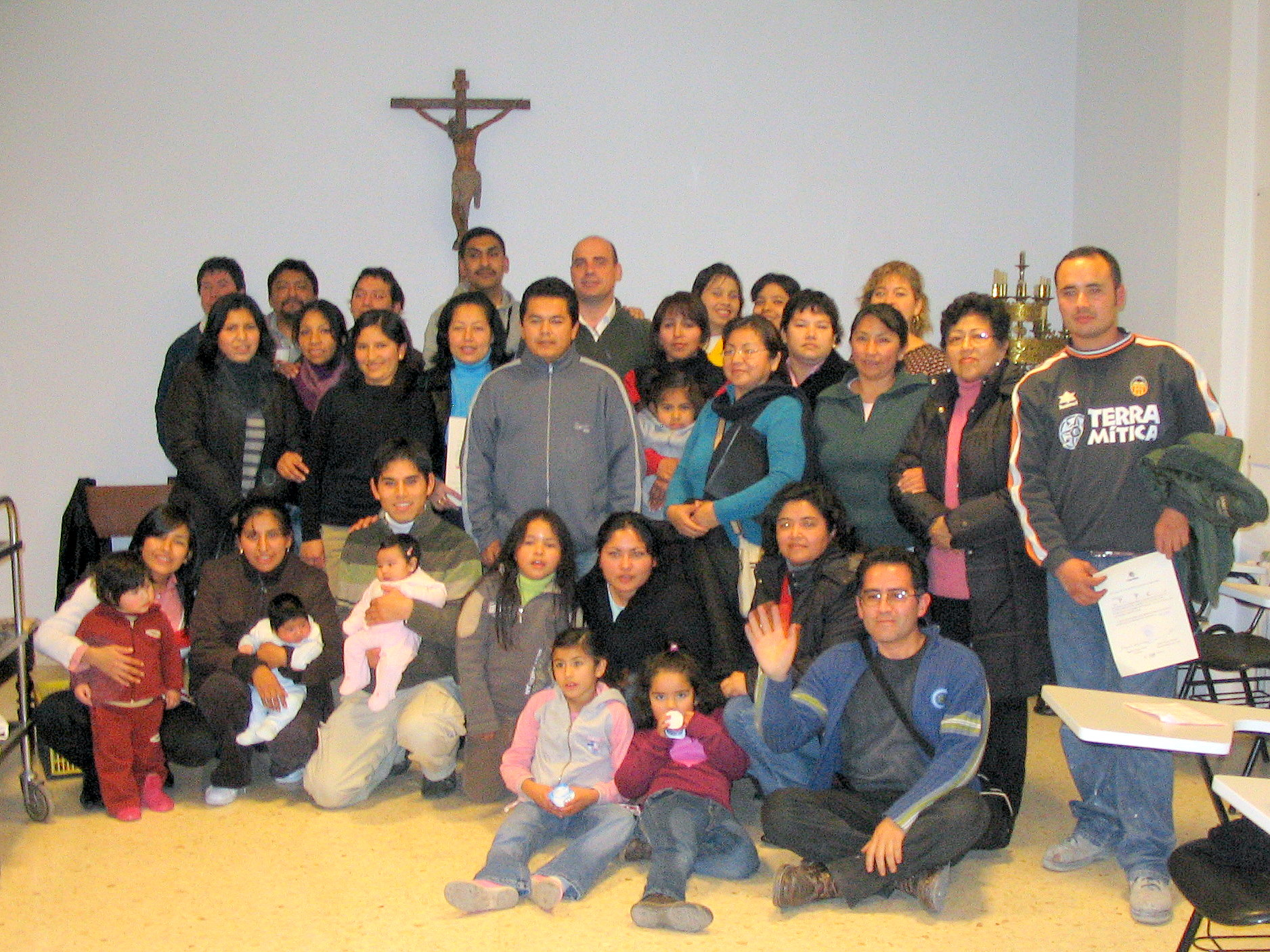 Benimamet - Convento de las Hermanas Reparadoras - Primer Curso de Valenciano - Una Muestra de Multiculturalidad en Benimamet